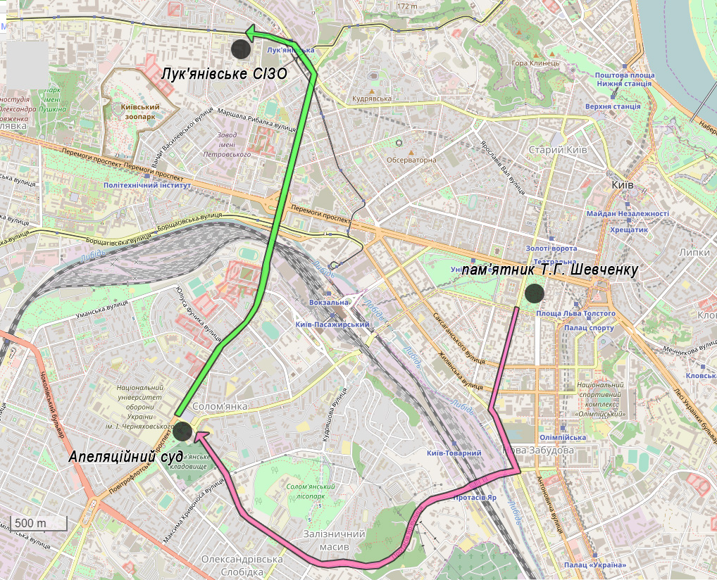 Хід акції "Повстань, Україно!" 9 березня 2003 року в Києві. Рух демонстрантів від Пам'ятника Шевченкові до Апеляційного суду м. Києва, а звідти - до Лук'янівського СІЗО. Реконструйовано за повідомленнями ЗМІ.